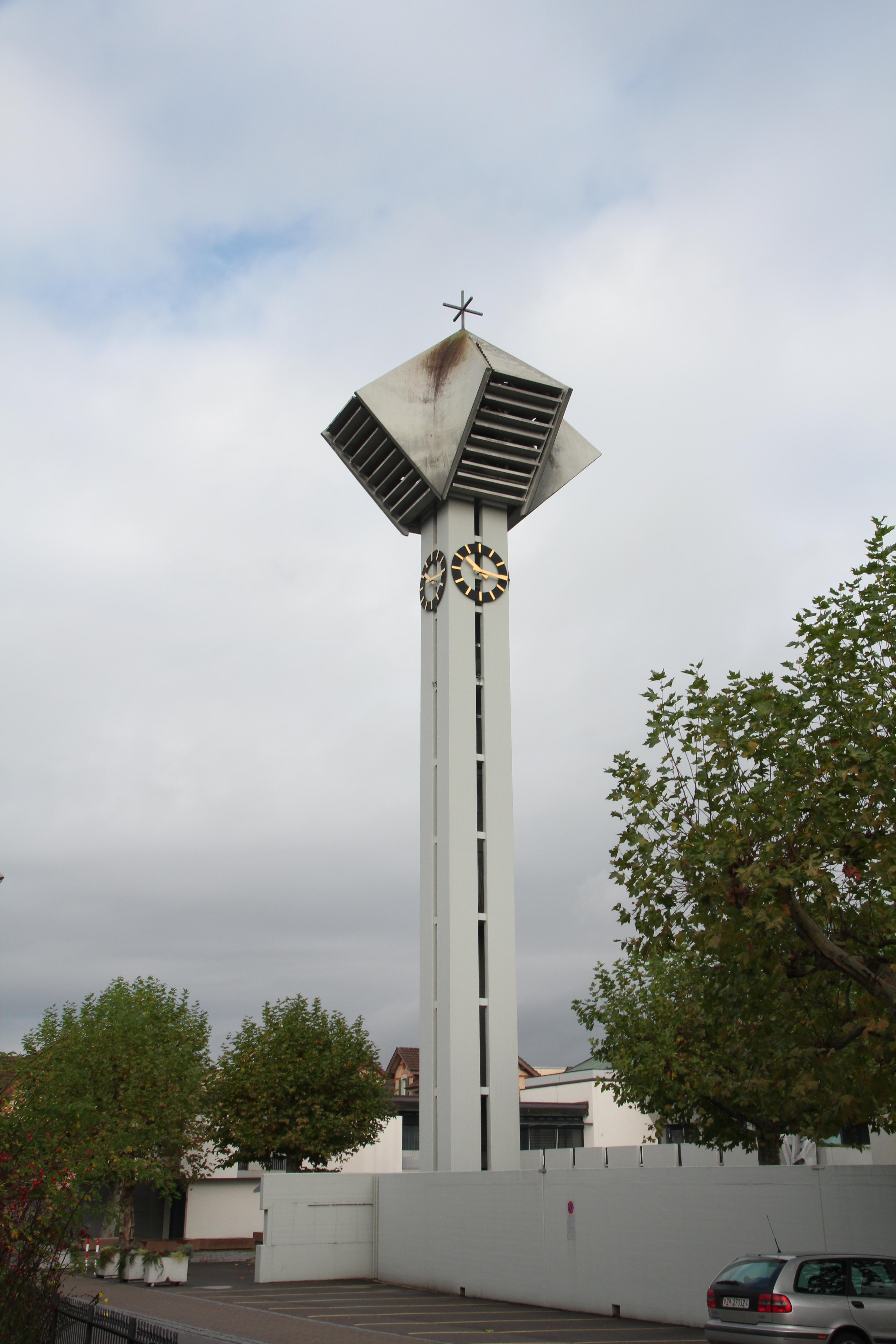 Römisch-katholische Pfarrkirche St. Andreas Uster, Kirchturm